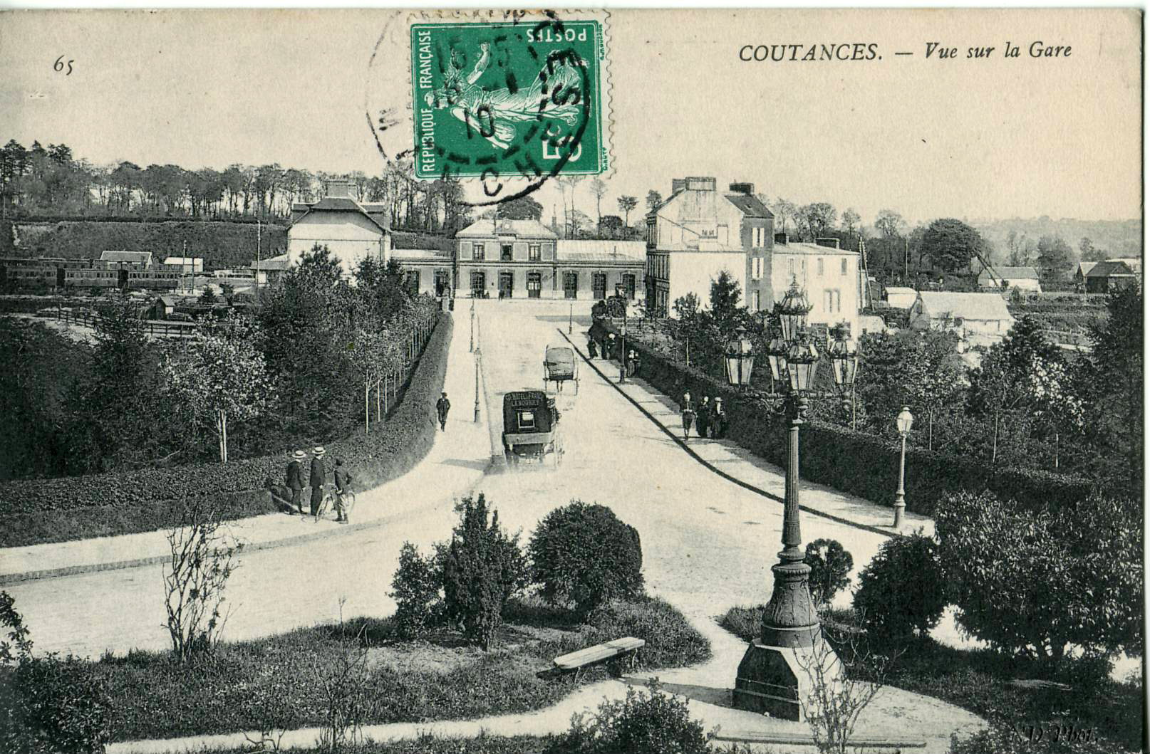 Carte postale ancienne éditée par ND, n°65 : COUTANCES - Vue sur la Gare